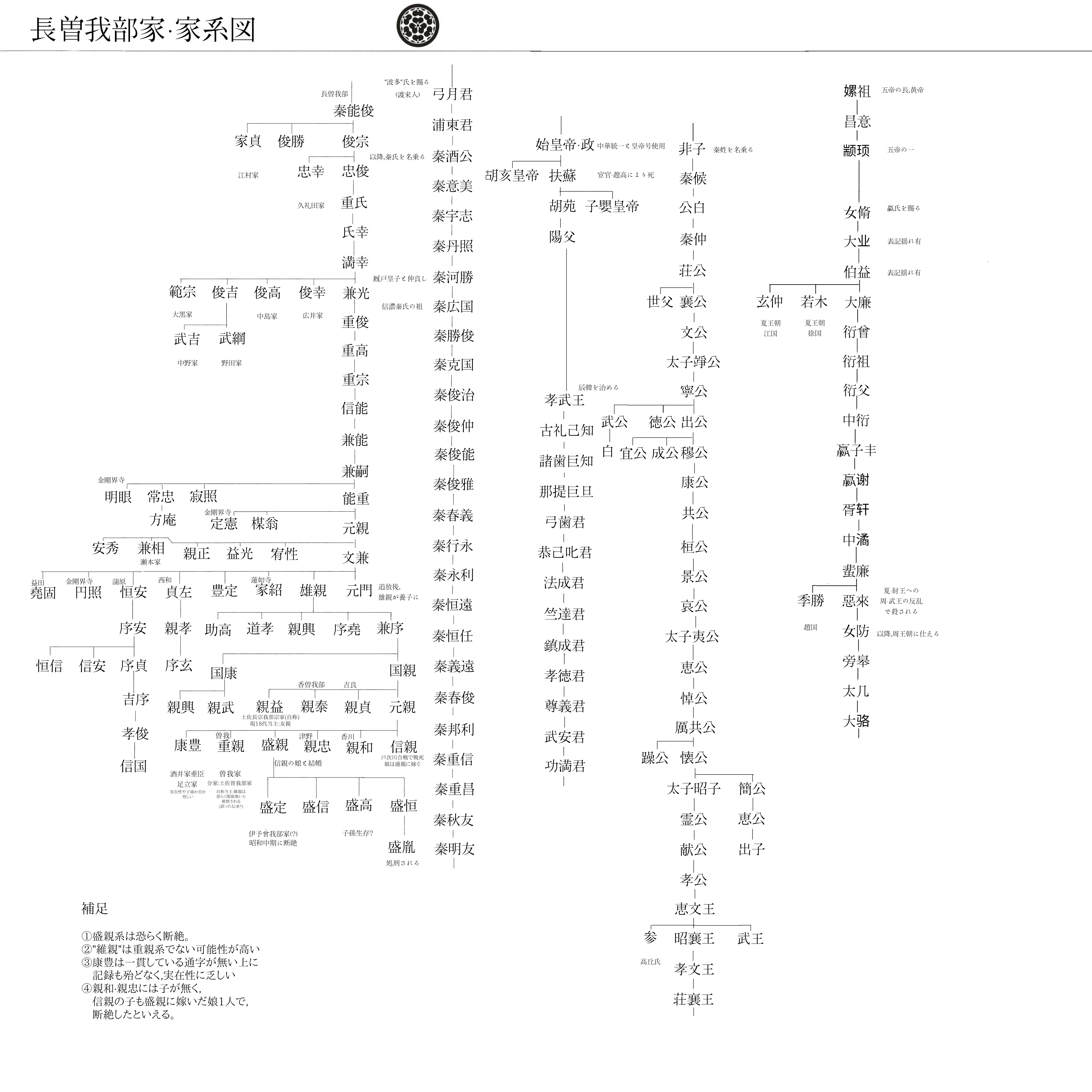 一部においては要出典であるため,出典求む。 孝武王以前は中国語版wikipediaを参照されたし。 秦河勝以降は日本語版wikipedia,長宗我部氏から。